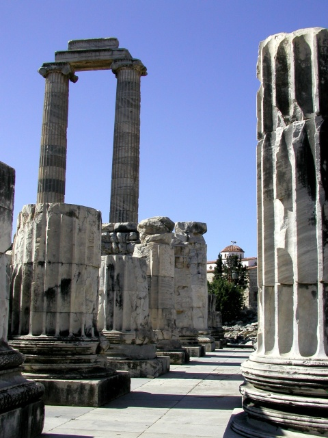 Der Apollon-Tempel bei Didyma Quelle: Fotografiert am 13.9.2004 Fotograf: Hans-Heinrich Hoffmann griechisch